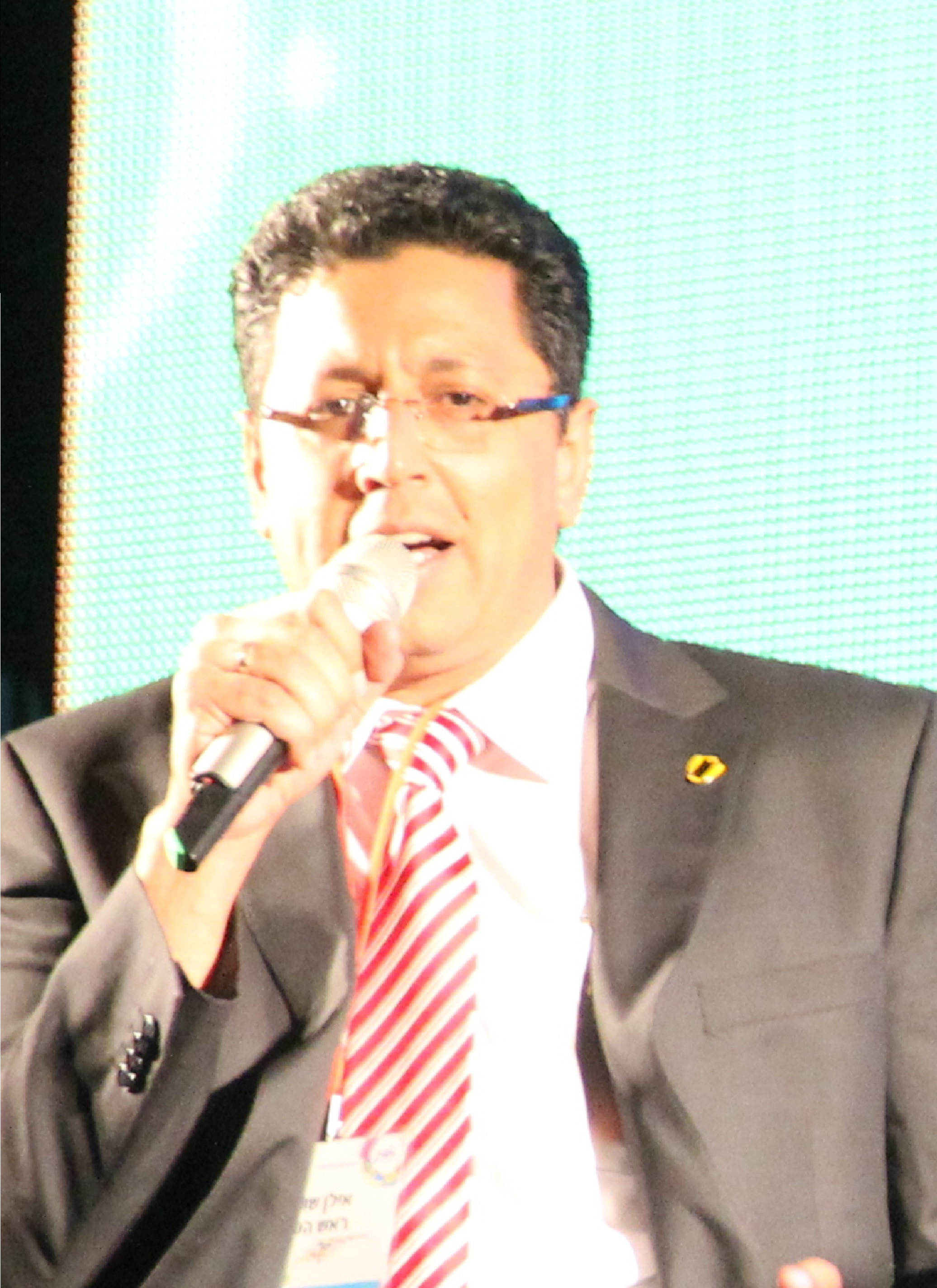 אילן שוחט